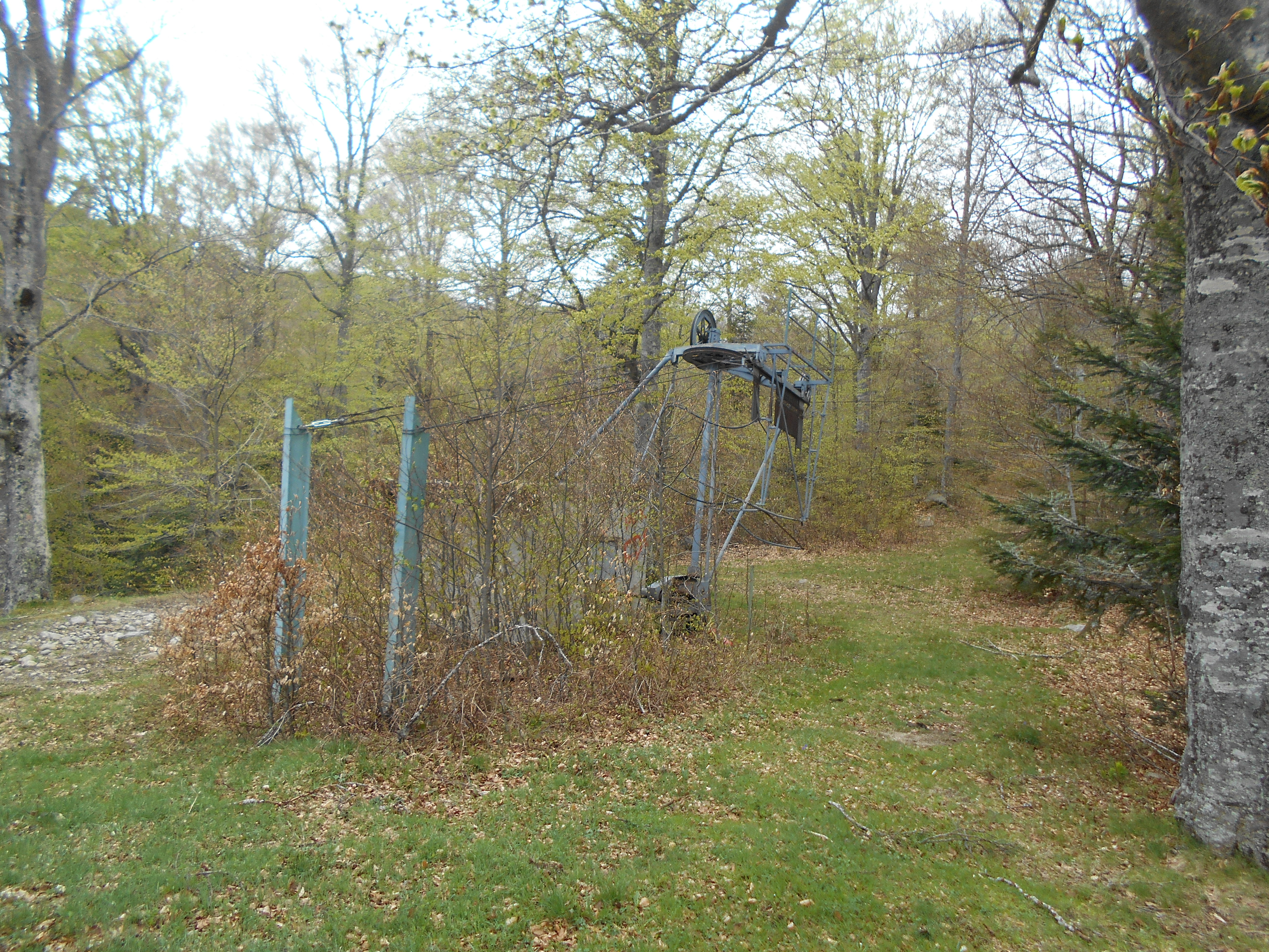 Antiga estació d'esquí de Coll de Jau